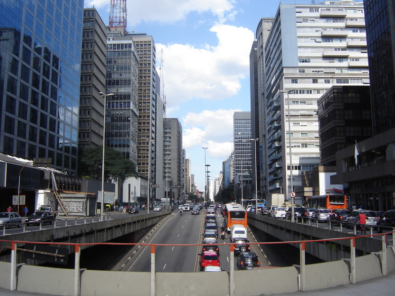 Avenida Paulista, na cidade de São Paulo, Brasil.